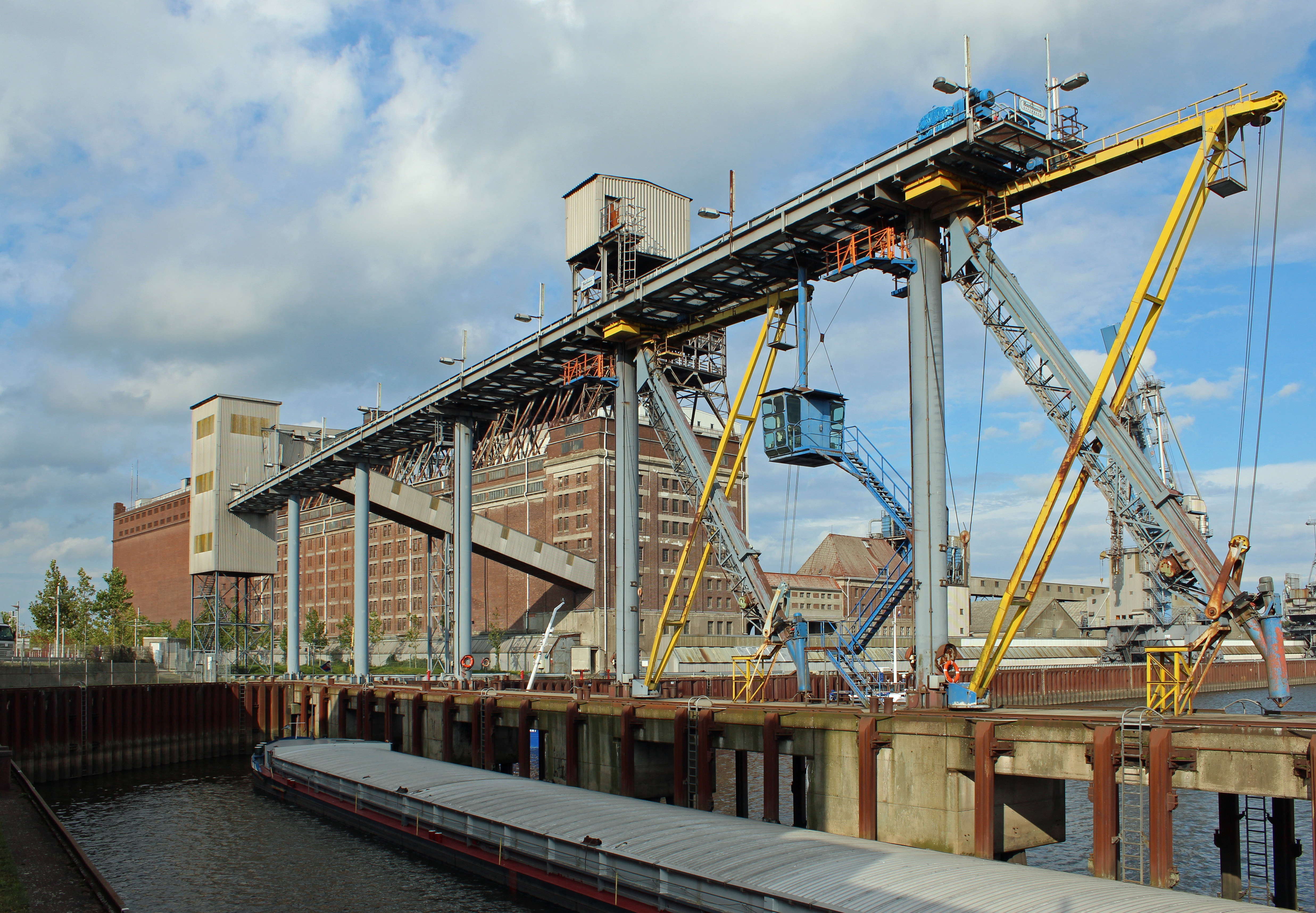 Getreideverkehrsanlage, Pier A in Bremen, Getreidestraße.Das abgebildete Objekt ist ein geschütztes Kulturdenkmal in der Freien Hansestadt Bremen, mit der Nr. 1752 beim Landesamt für Denkmalpflege registriert.